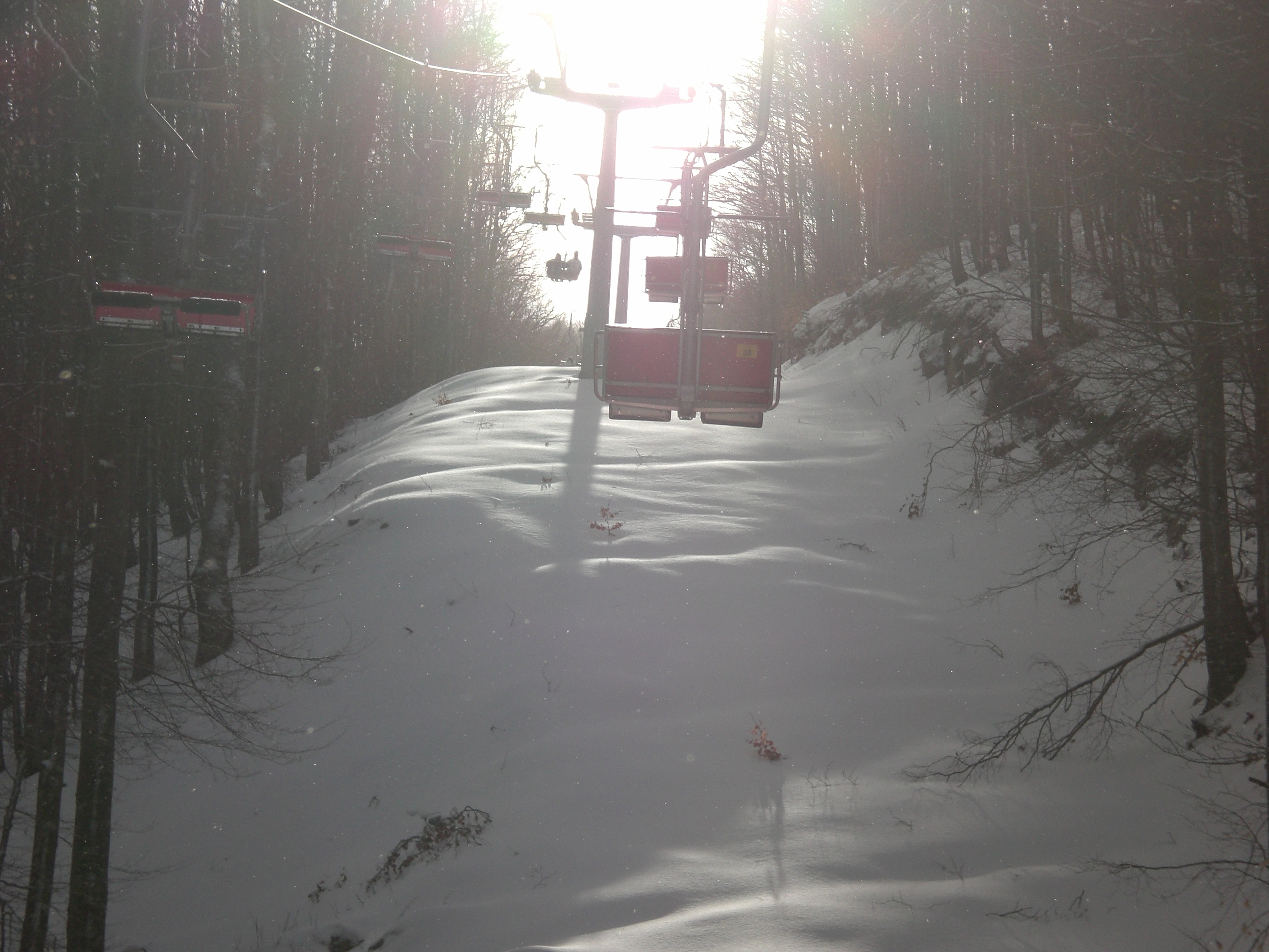 Foto scattata da me in Marzo 2008.